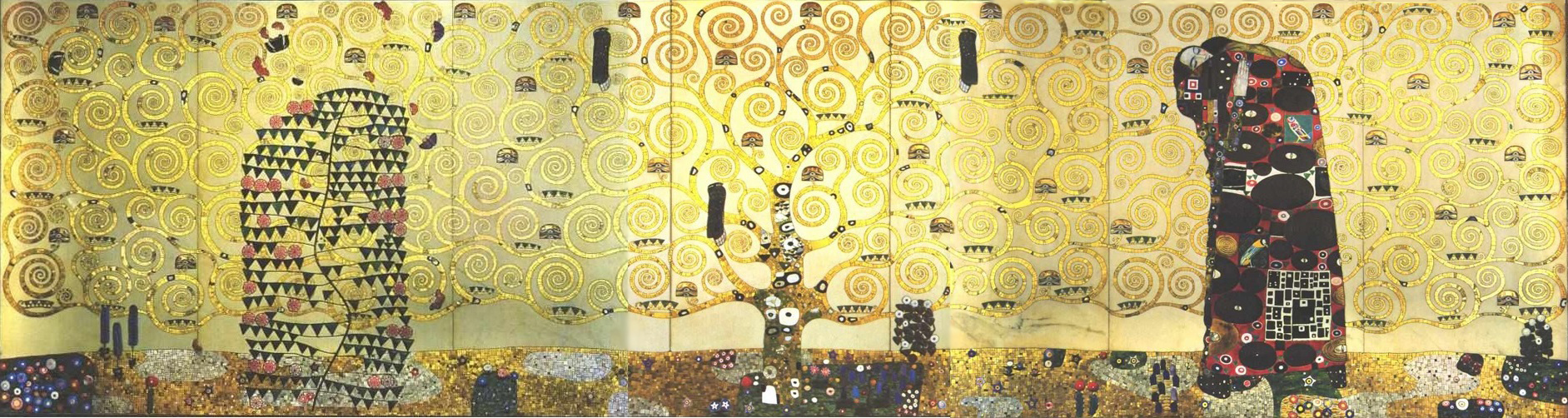 Stoclet-fries, rechterpaneel, de Omarming (De Vervulling).